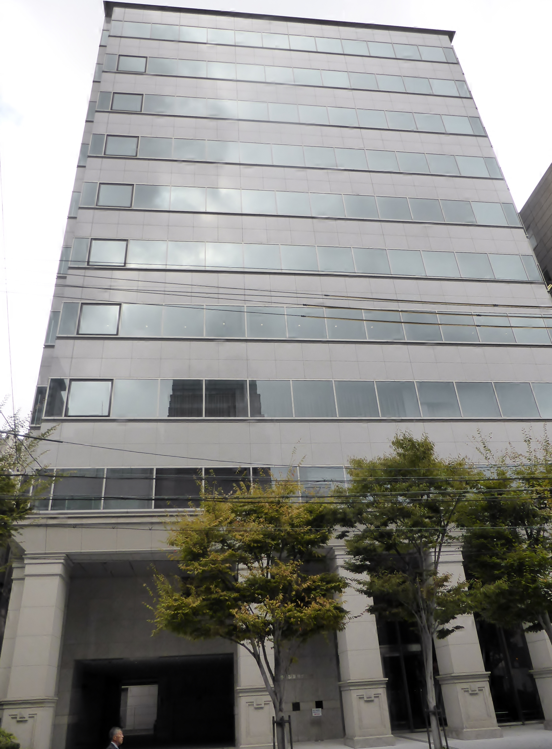 塩野義製薬株式会社本社を撮影。